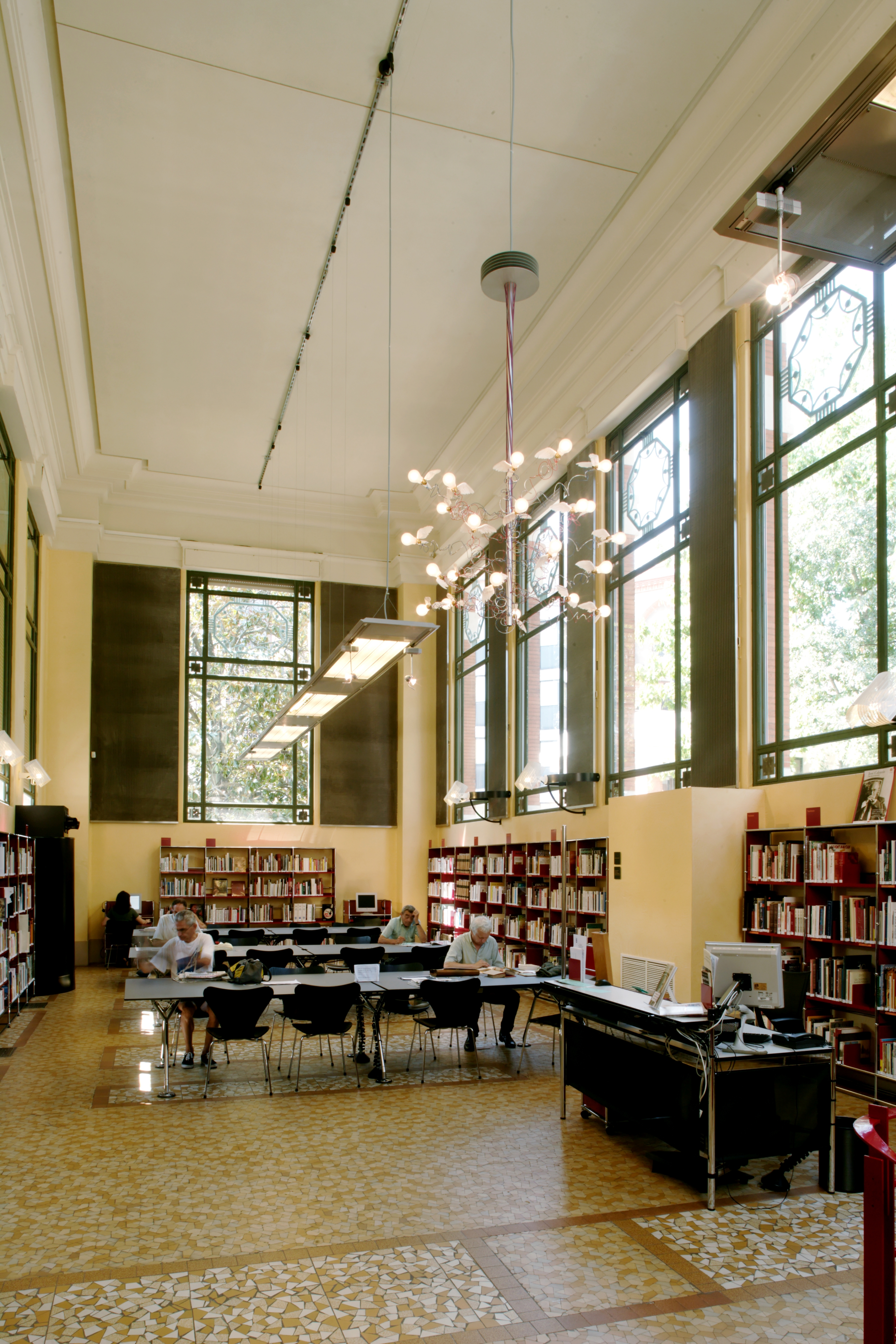 Bibliothèque d'Etude et du Patrimoine, Toulouse.